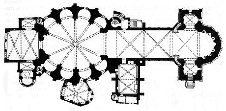 Basilika St. Gereon Köln